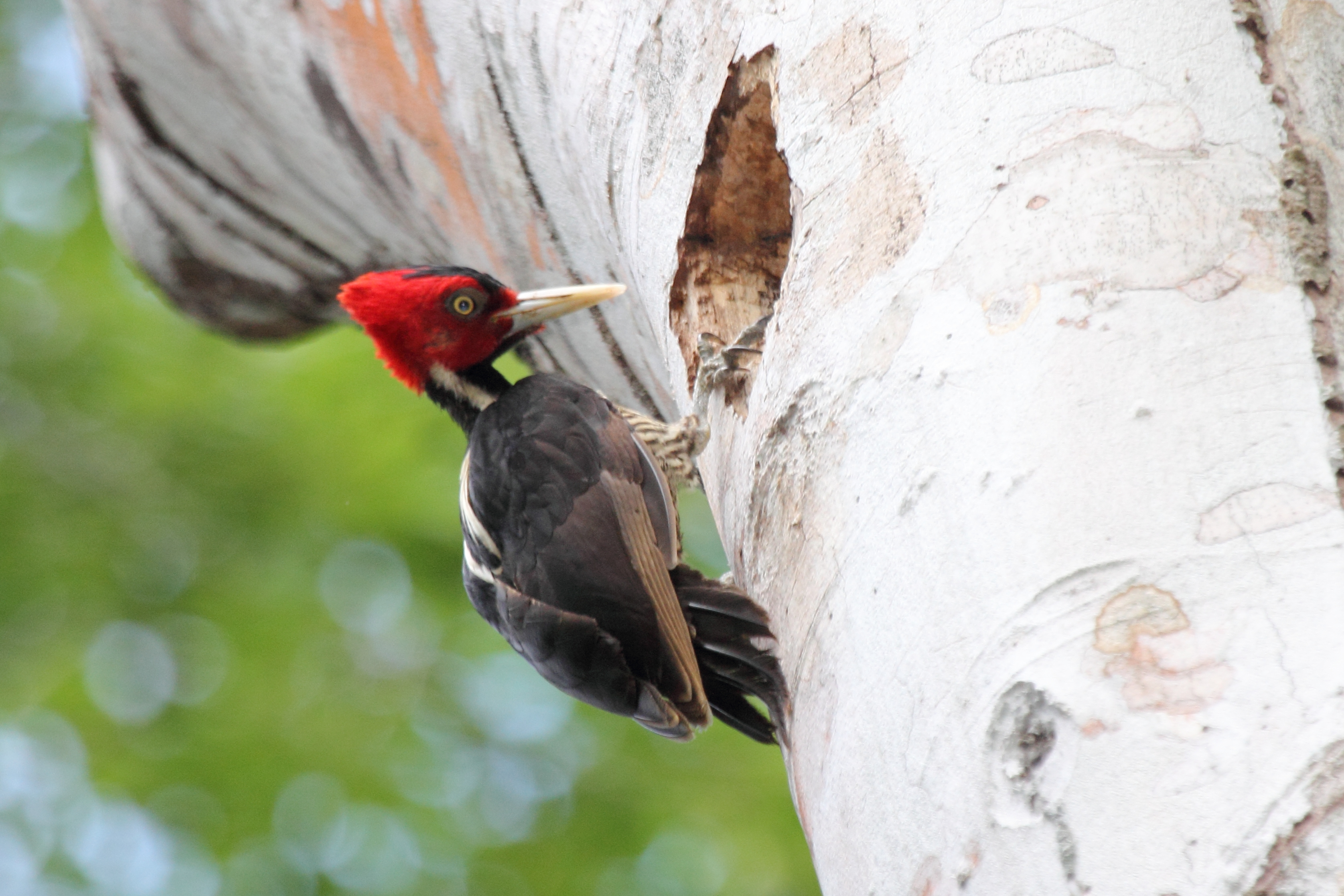 female